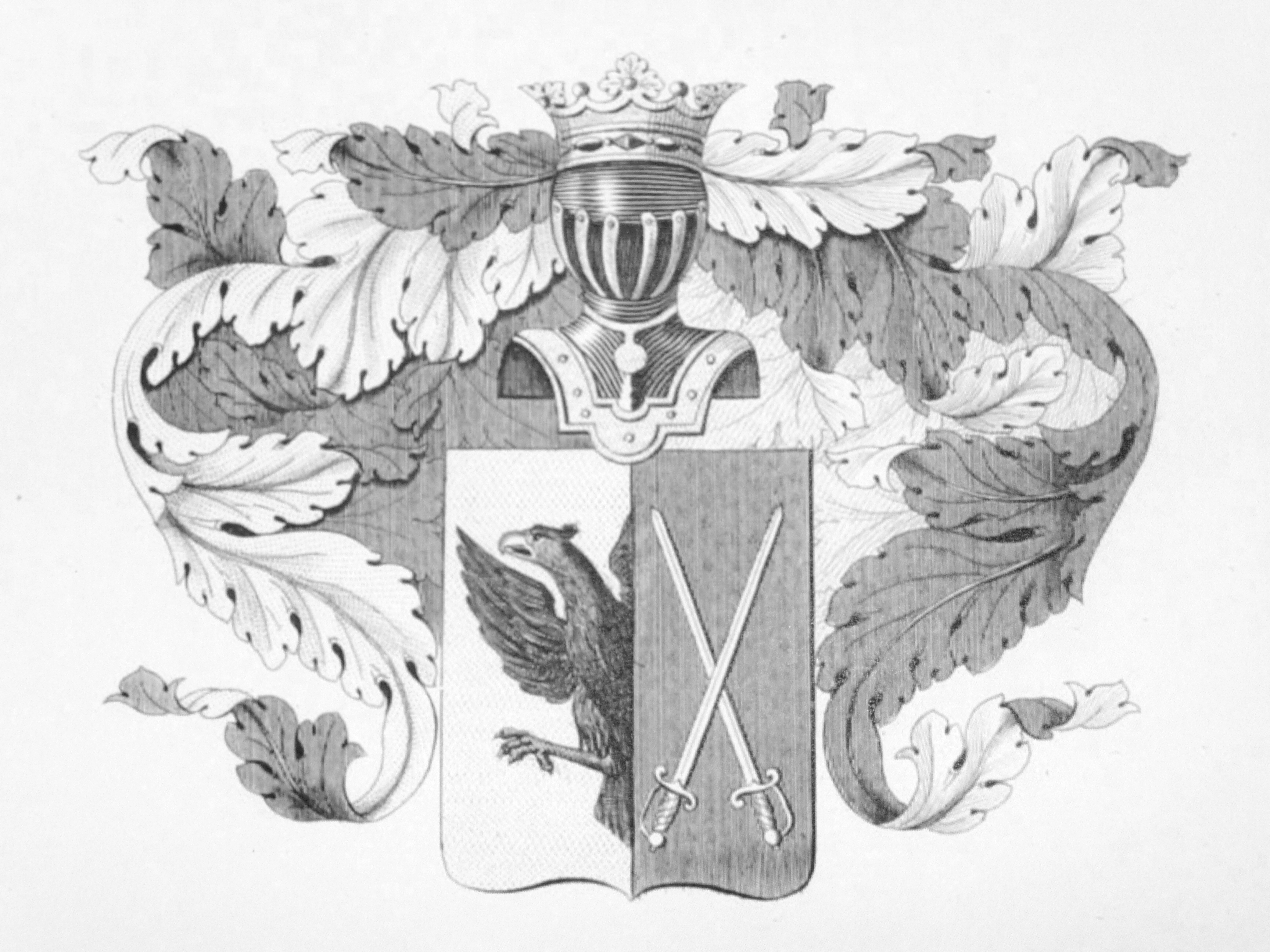 Armes de la famille des comtes Tolboukhine